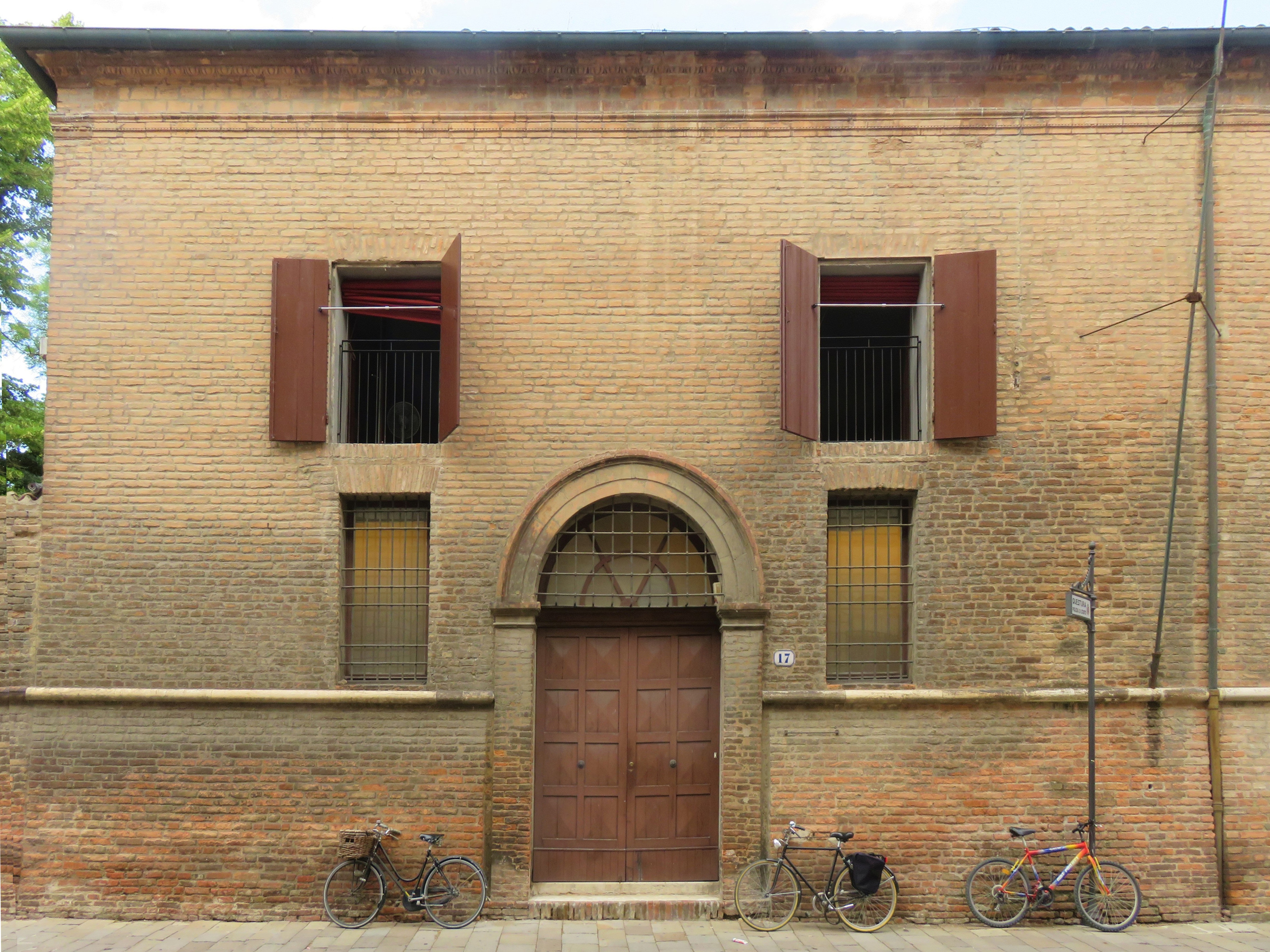 Sede del Museo Michelangelo Antonioni, a Ferrara, dal 1995 al 2006. Corso Ercole I d'Este 17